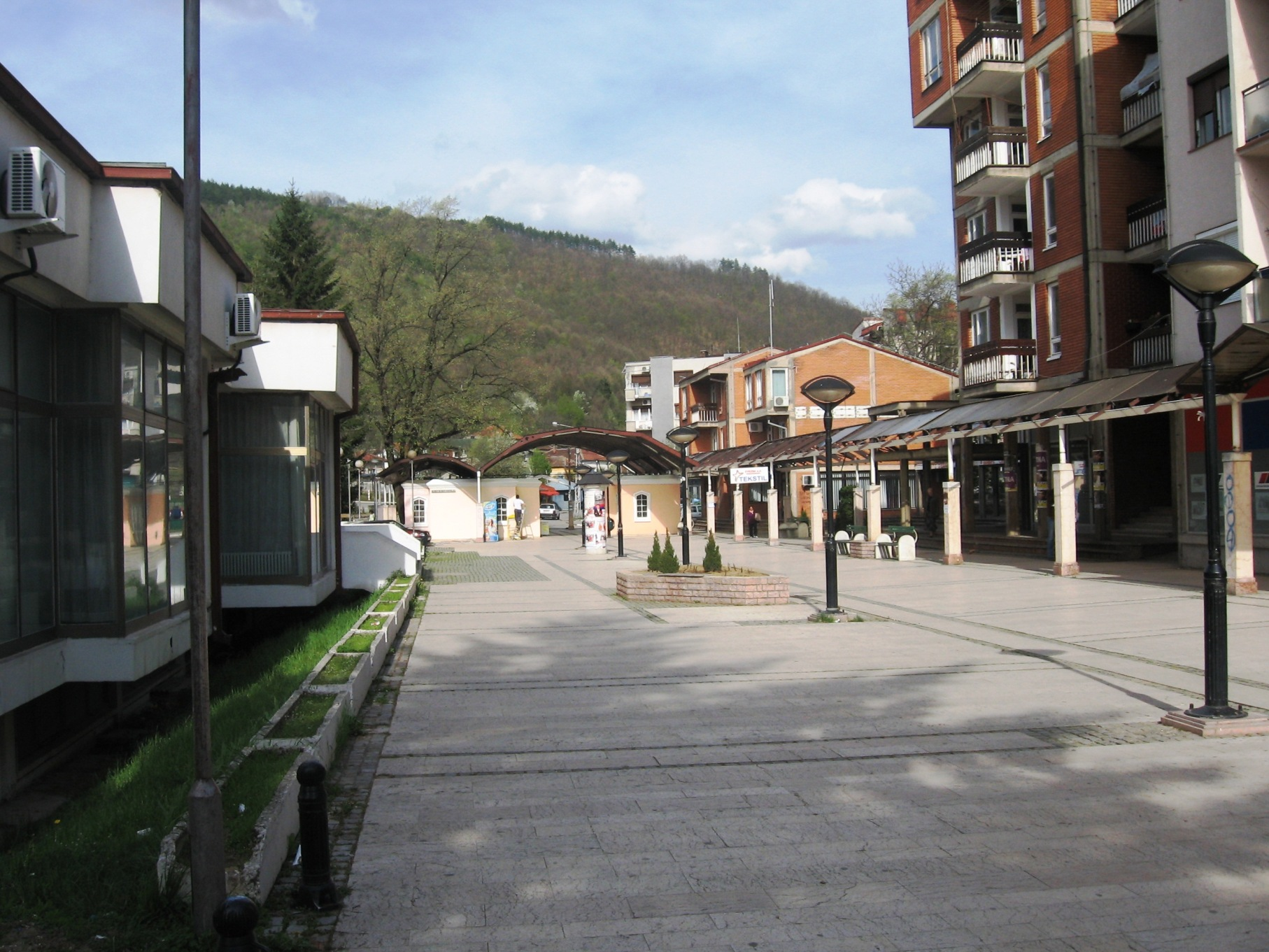 Пешачка улица у Сурдулици.